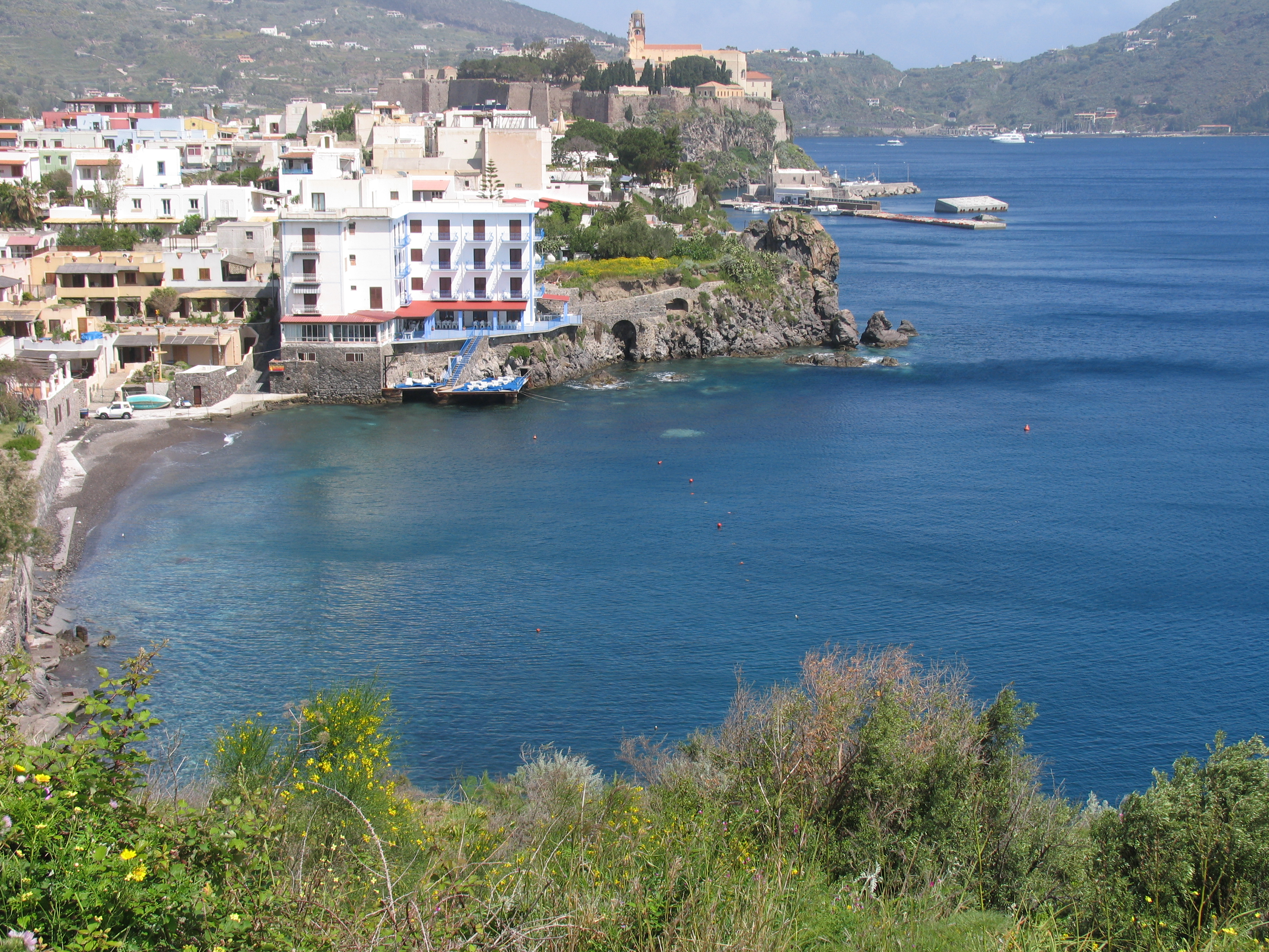 Isola di Lipari. La baia conosciuta come Portinente